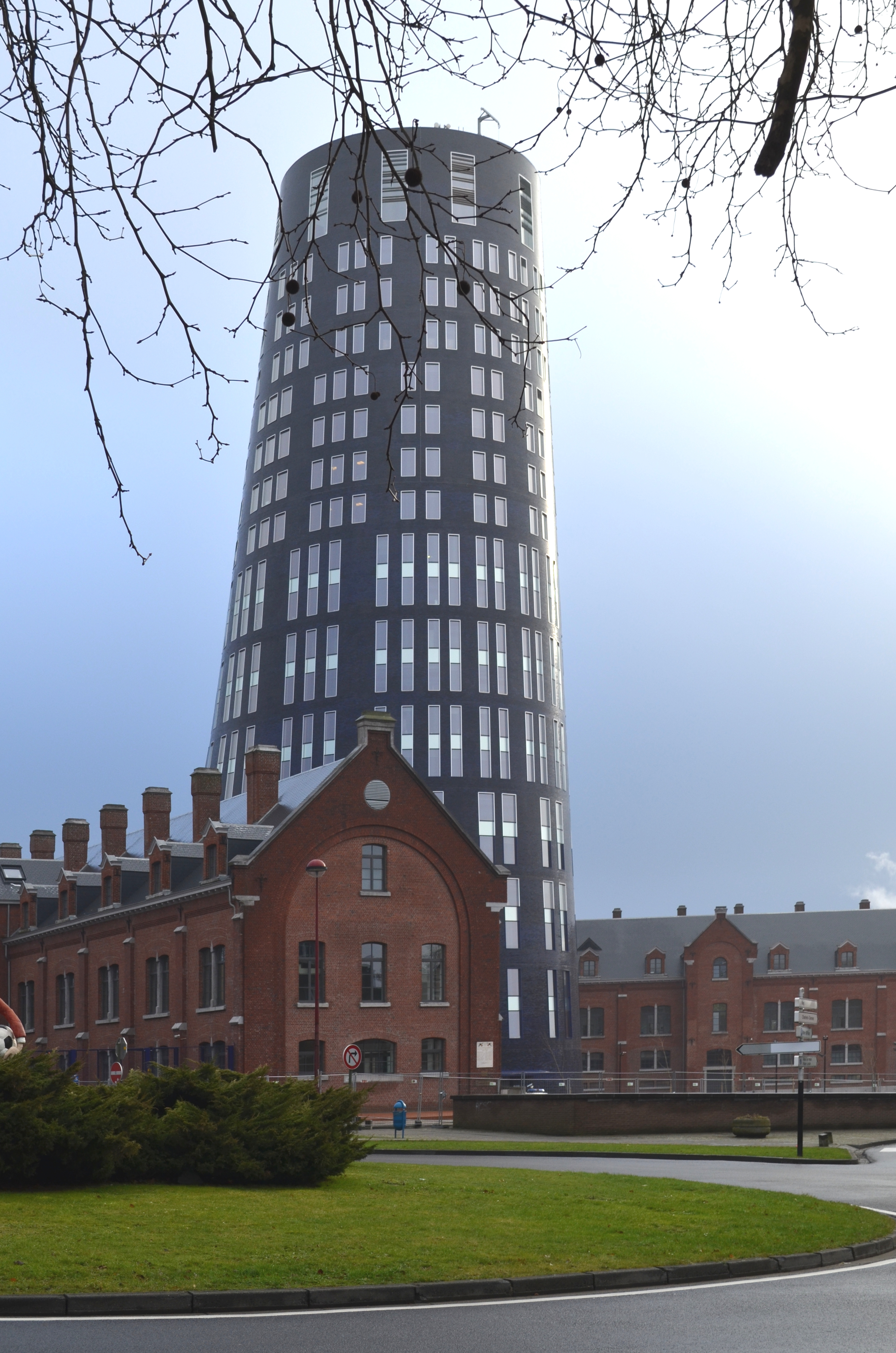 Hôtel de police de la Zone de police Charleroi.